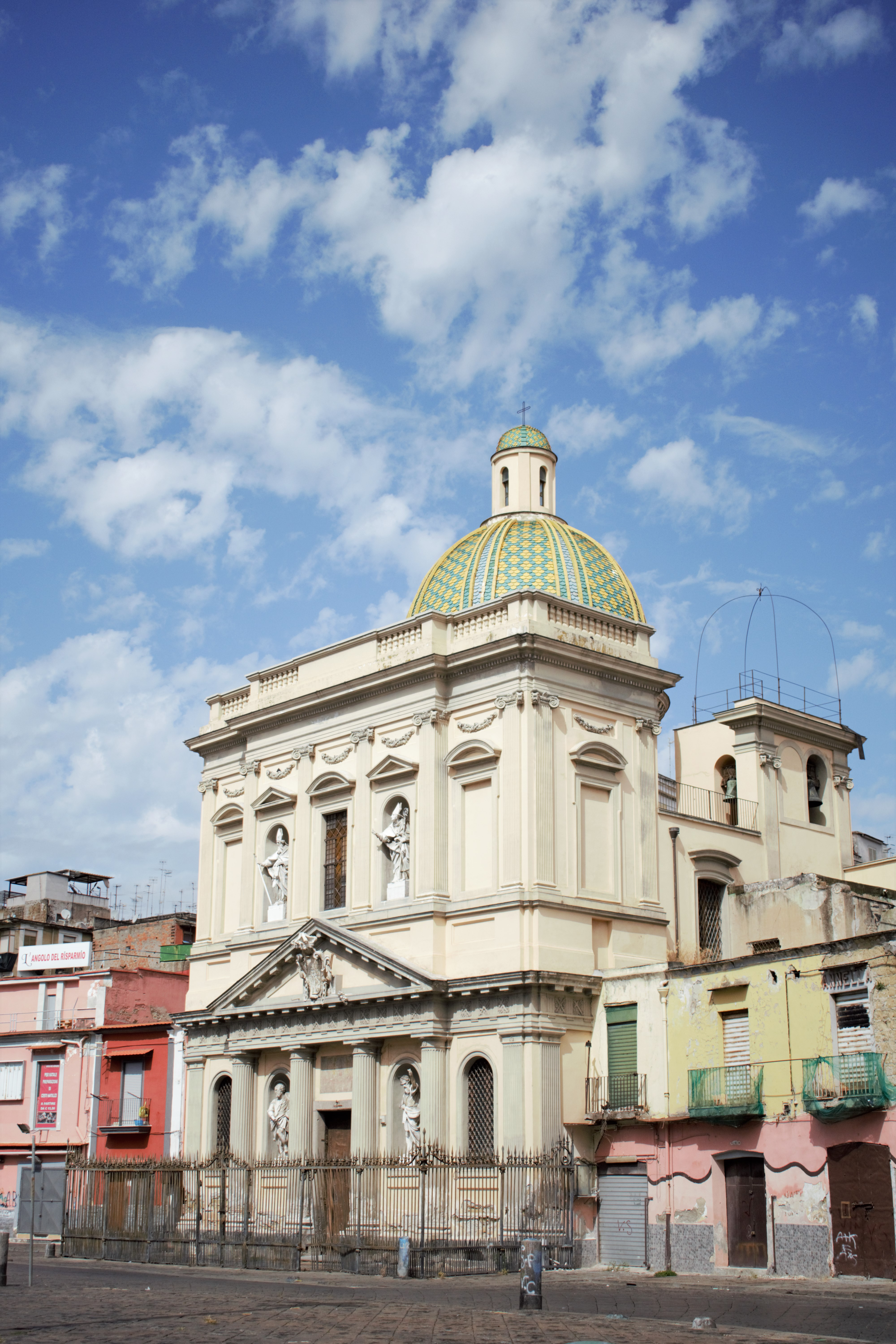 Faccita Santa Croce al Mercato, Napoli